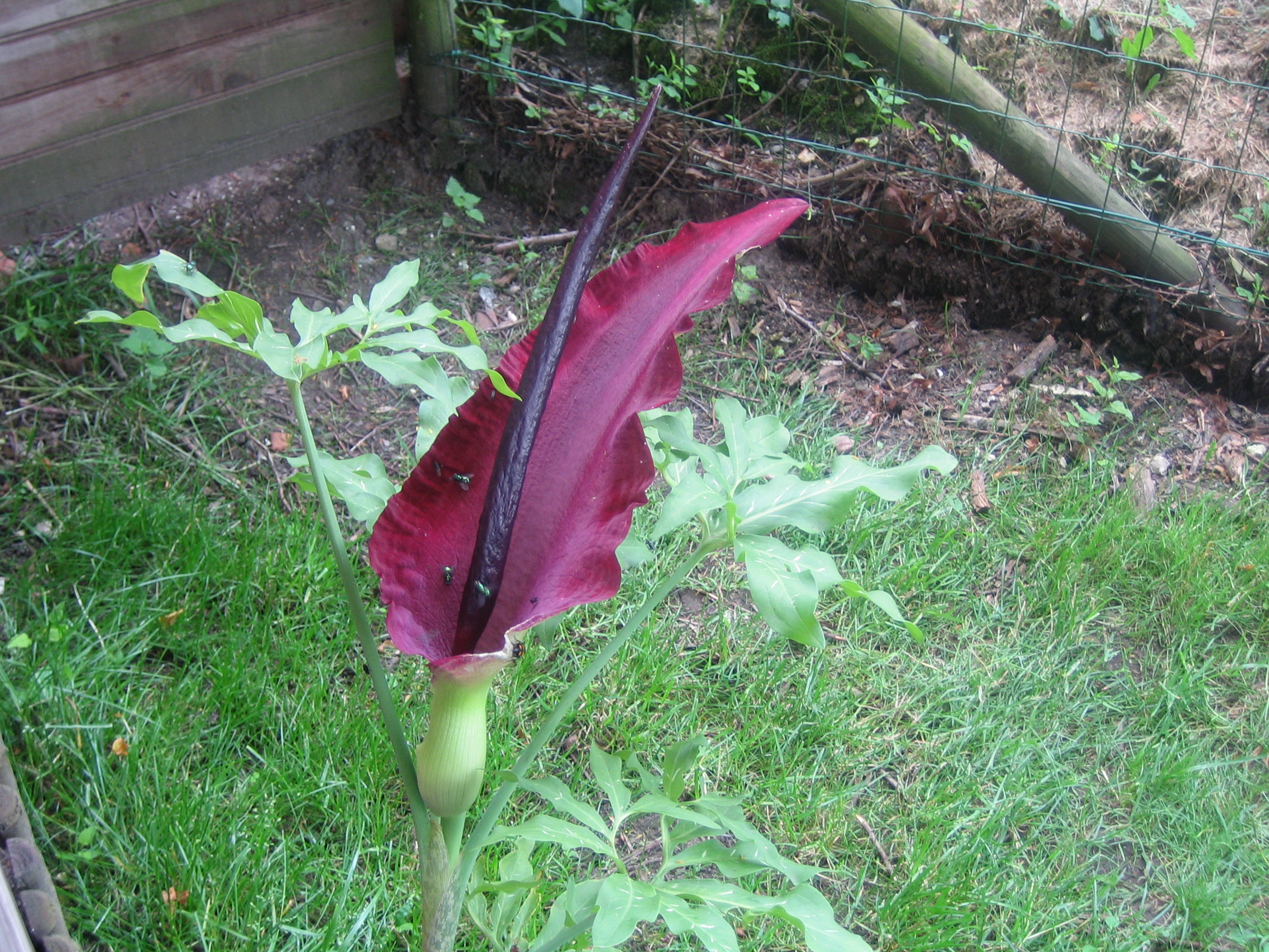 Dracunculus vulgaris (Serpentaire)